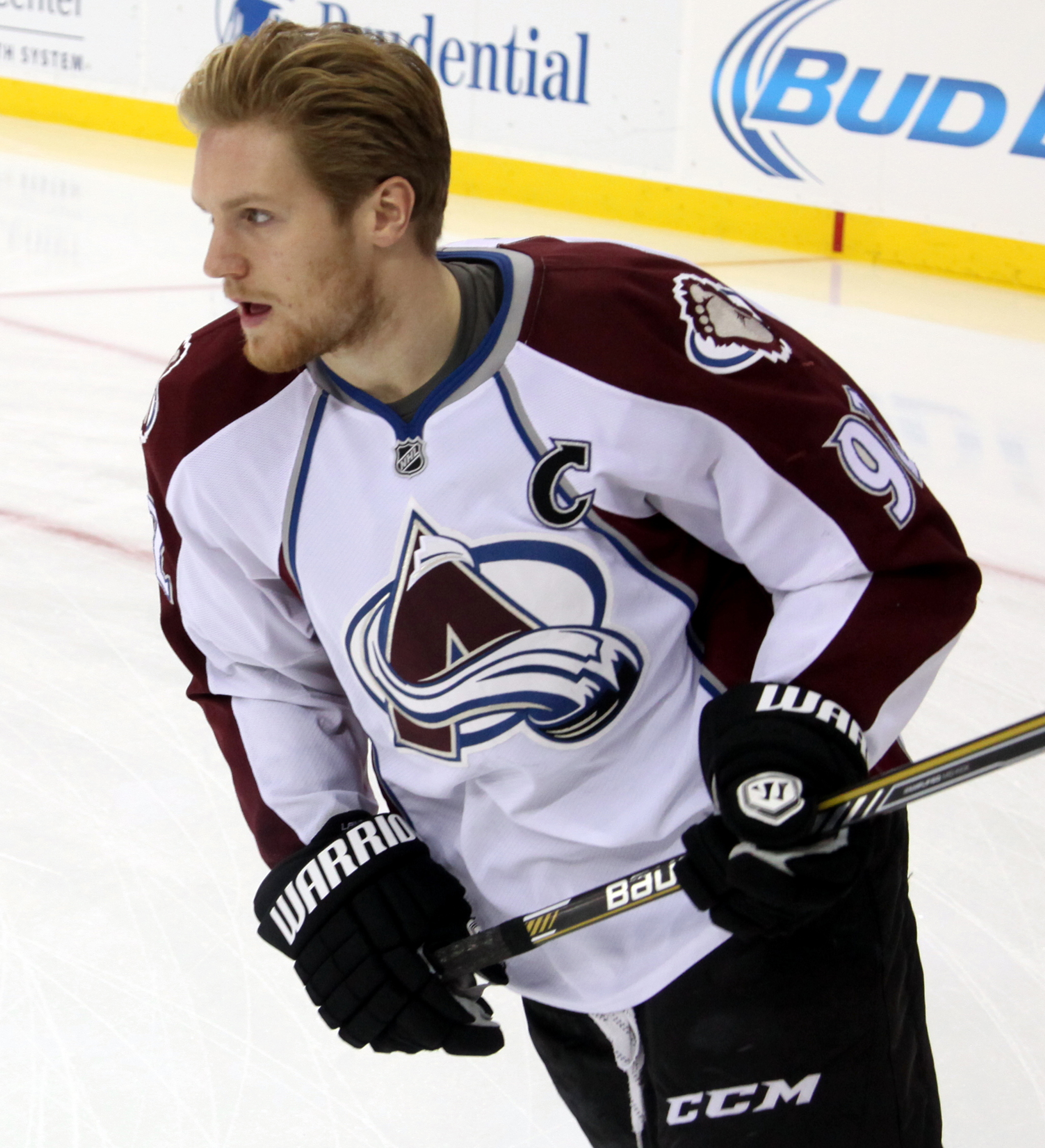 Landeskog in November 2014.